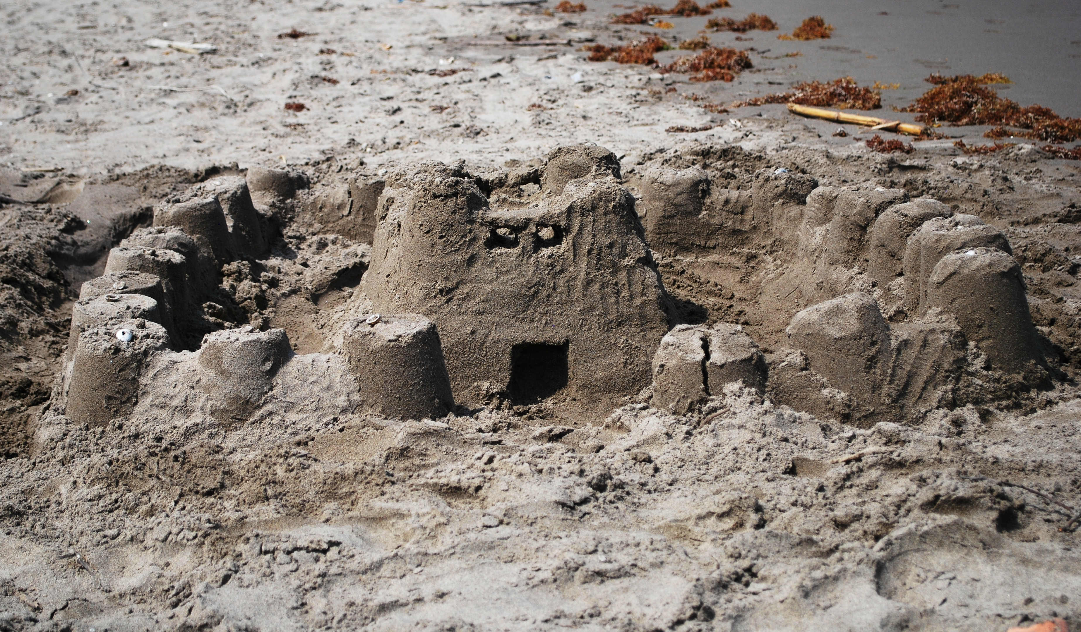 Sand castle on Playa Sur in Barra de Cazones, Veracruz